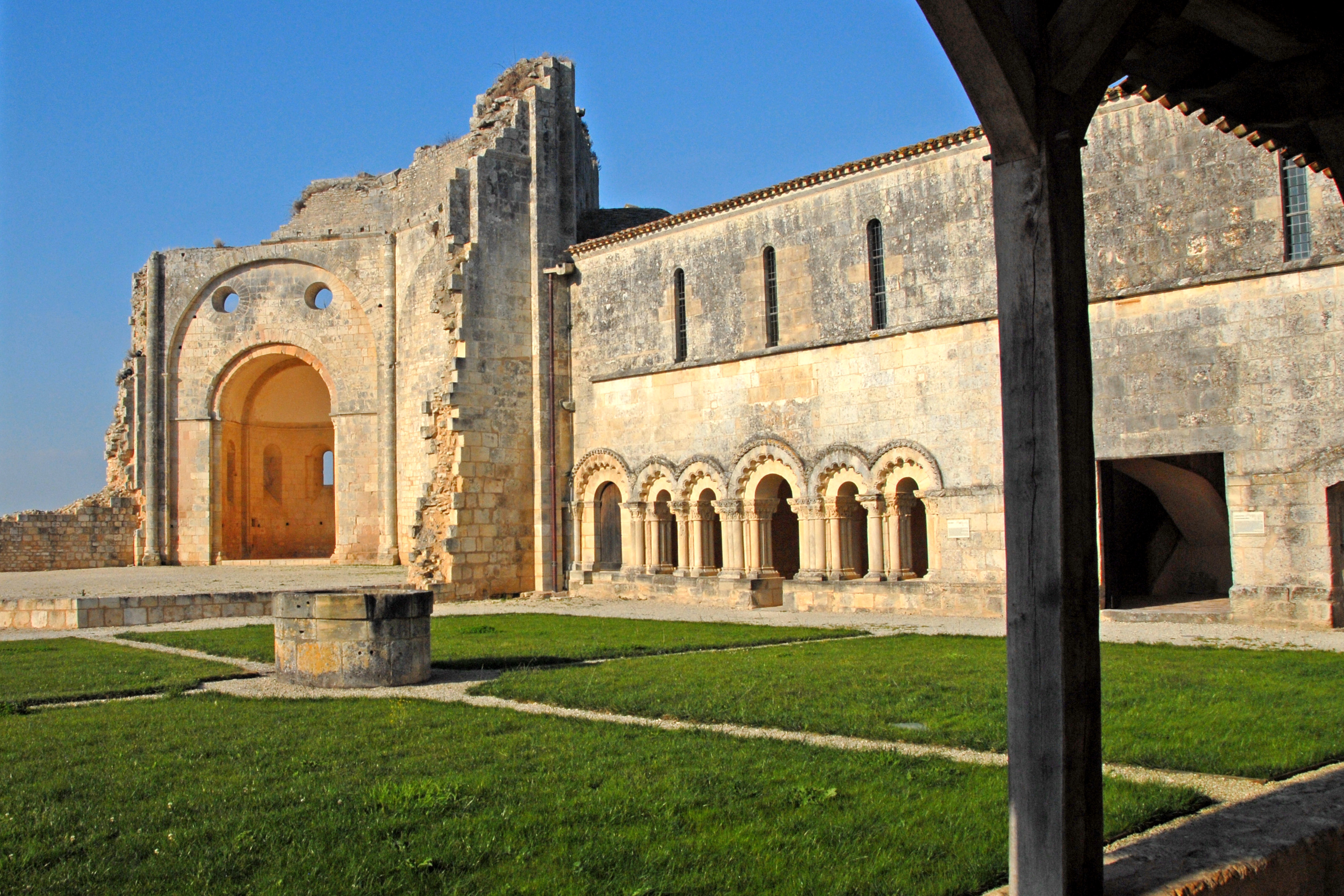 Abtei Trizay, Hof, ehemaliger Kreuzgang